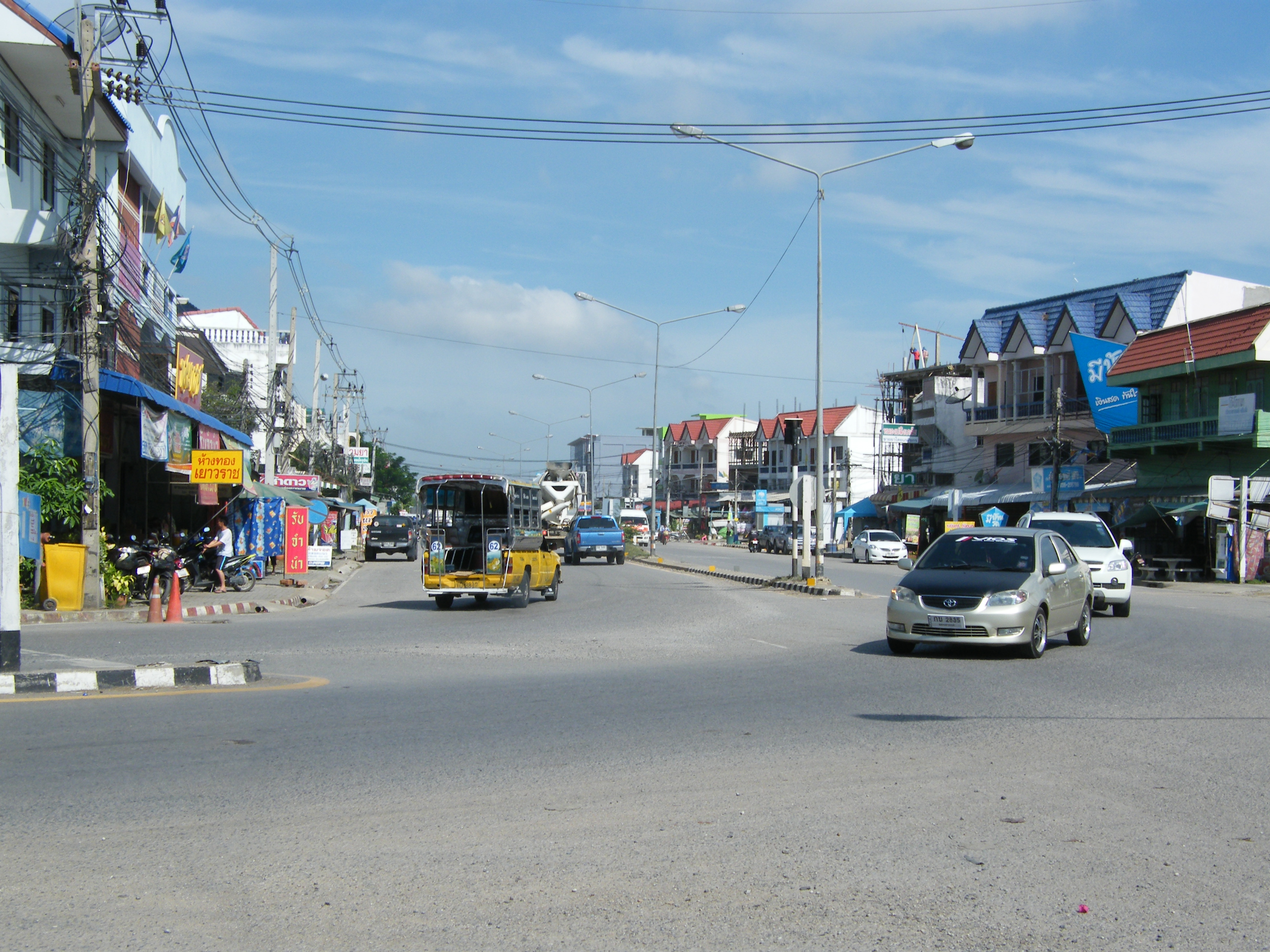 Nong Pling, Mueang Nakhon Sawan District, Nakhon Sawan 60000, Thailand